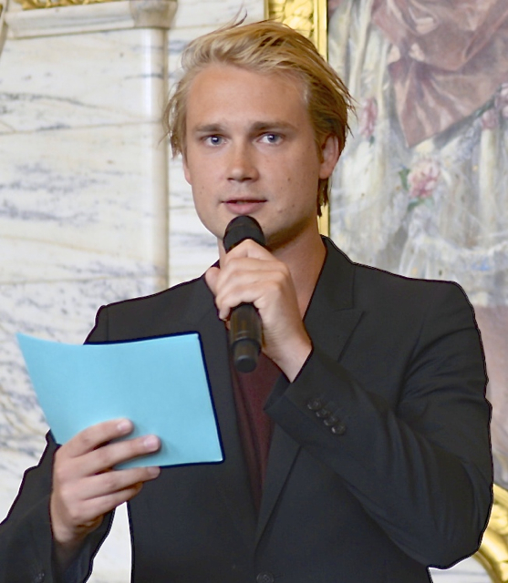 Christoffer Svensson under Dramatens höstsamling den 19 augusti 2014.